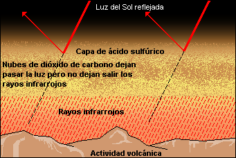 Autor: Usuario:Luis María Benítez